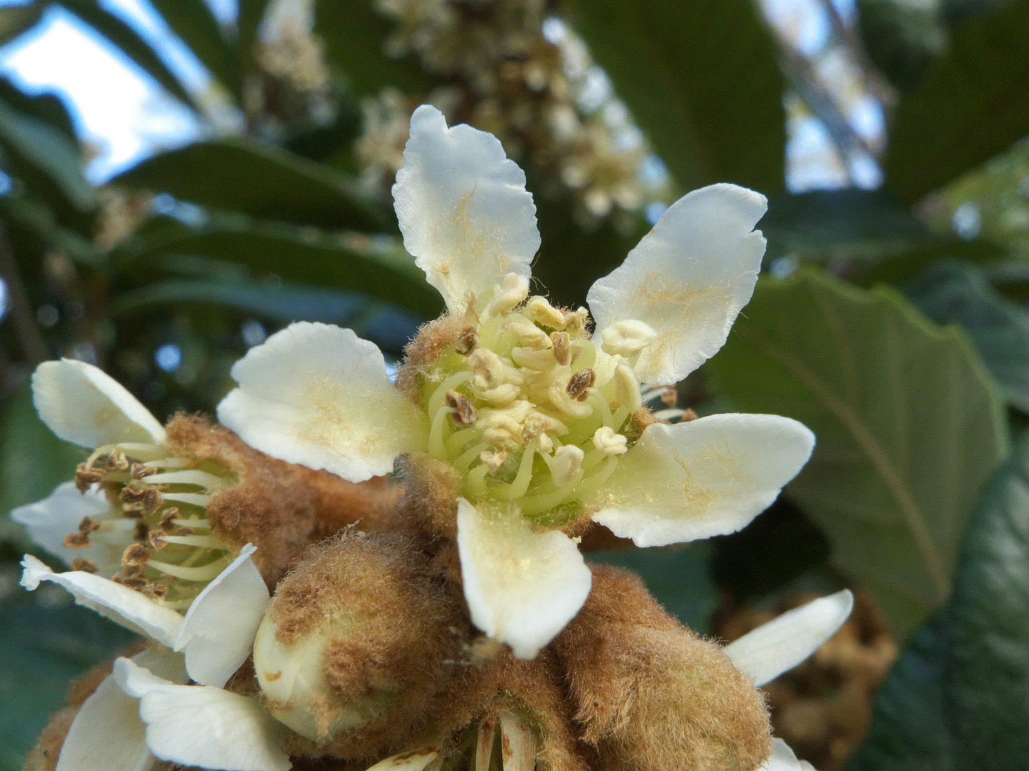 Flor del níspero del Japón (Eriobotrya japonica, Rosaceae). Barrio de Moratalaz, Madrid, España.